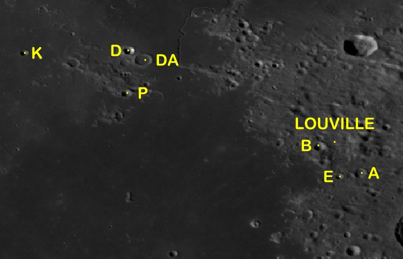 Cráter lunar Louville. Cráteres satélite. (Imagen LRO)